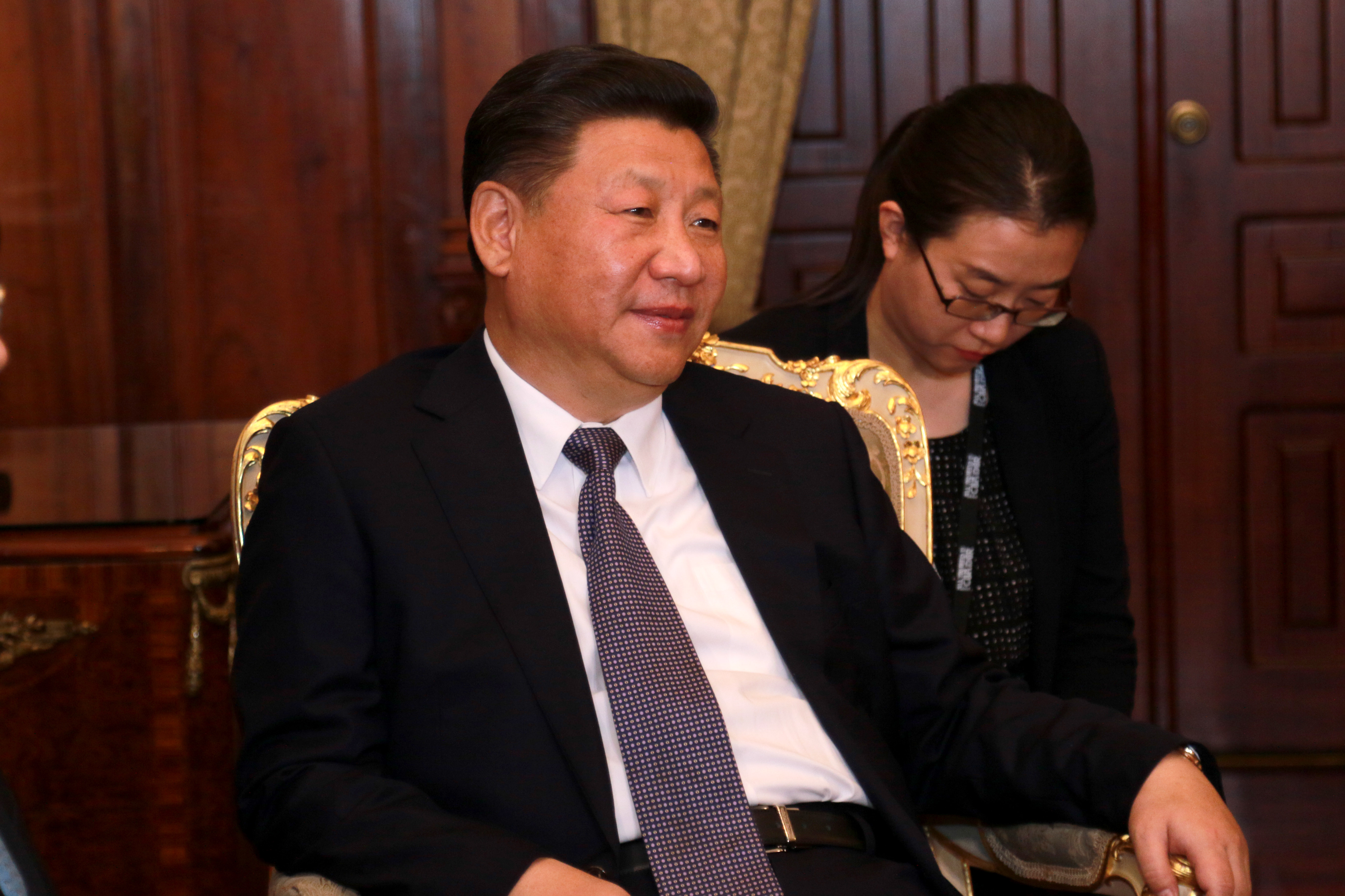 Quito 17 Nov (Andes).- El presidente de la República Popular de China, Xi Jinping realizó una visita oficial al Ecuador, el presidente Correa lo recibió con honores. Fotografías: Carlos Rodríguez/Andes